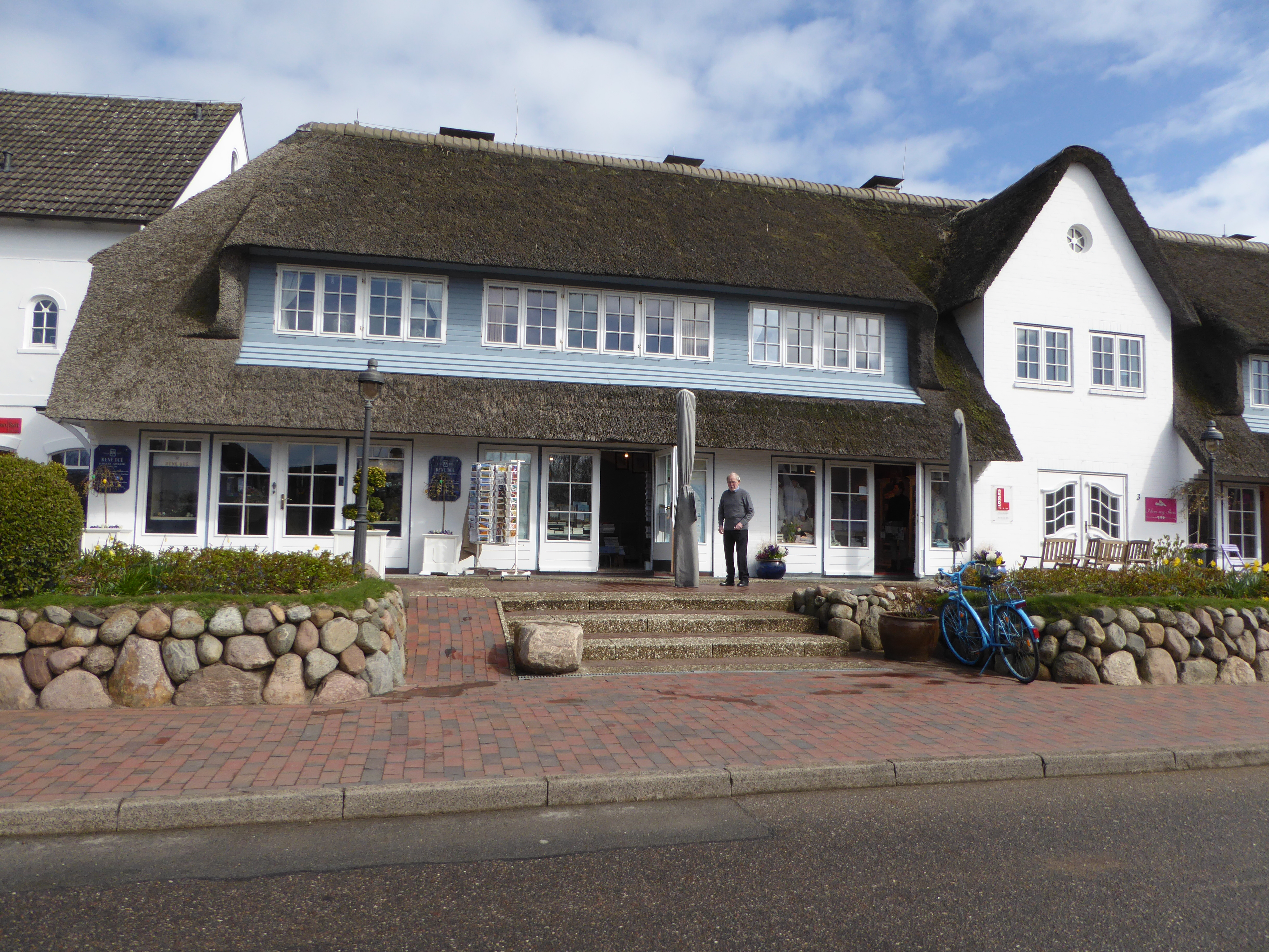 Helmut Schwarz vor der Büchertruhe Keitum, Hildegard Steiner-Schwarz & Helmut Schwarz, Am Tipkenhoog 3 25980 Sylt / Keitum